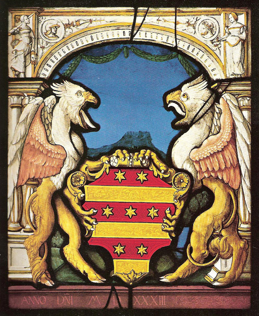 Wappenscheibe der Stadt Rheinfelden aus dem Jahr 1533. Standort: Rathaus von Rheinfelden.